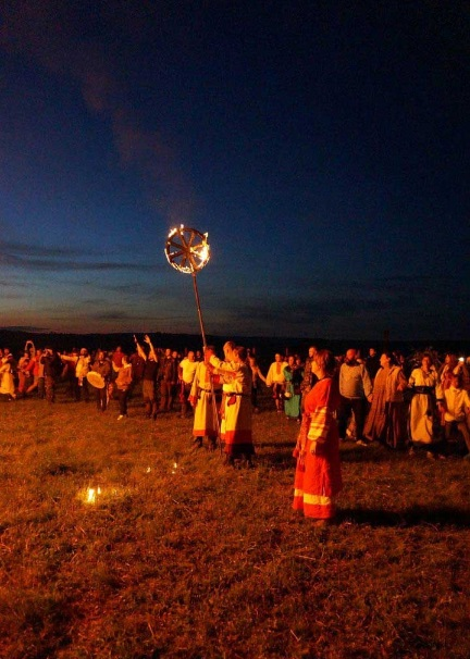 Kupala 2017 celebrated by the Union of Slavic Rodnover Communities (Союз Славянских Общин Славянской Родной Веры), in Krasotinka, Kaluga, Russia.